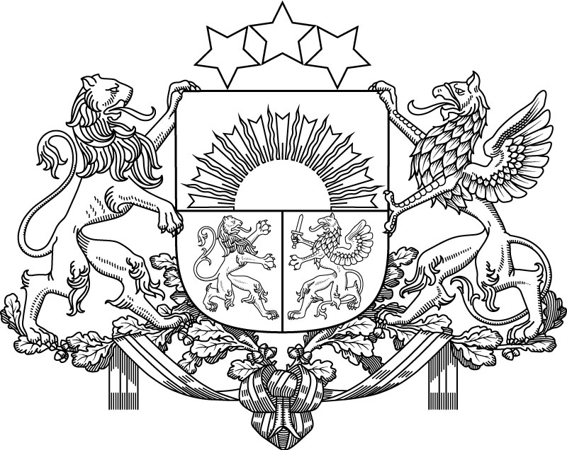 LR lielais ģerbonis